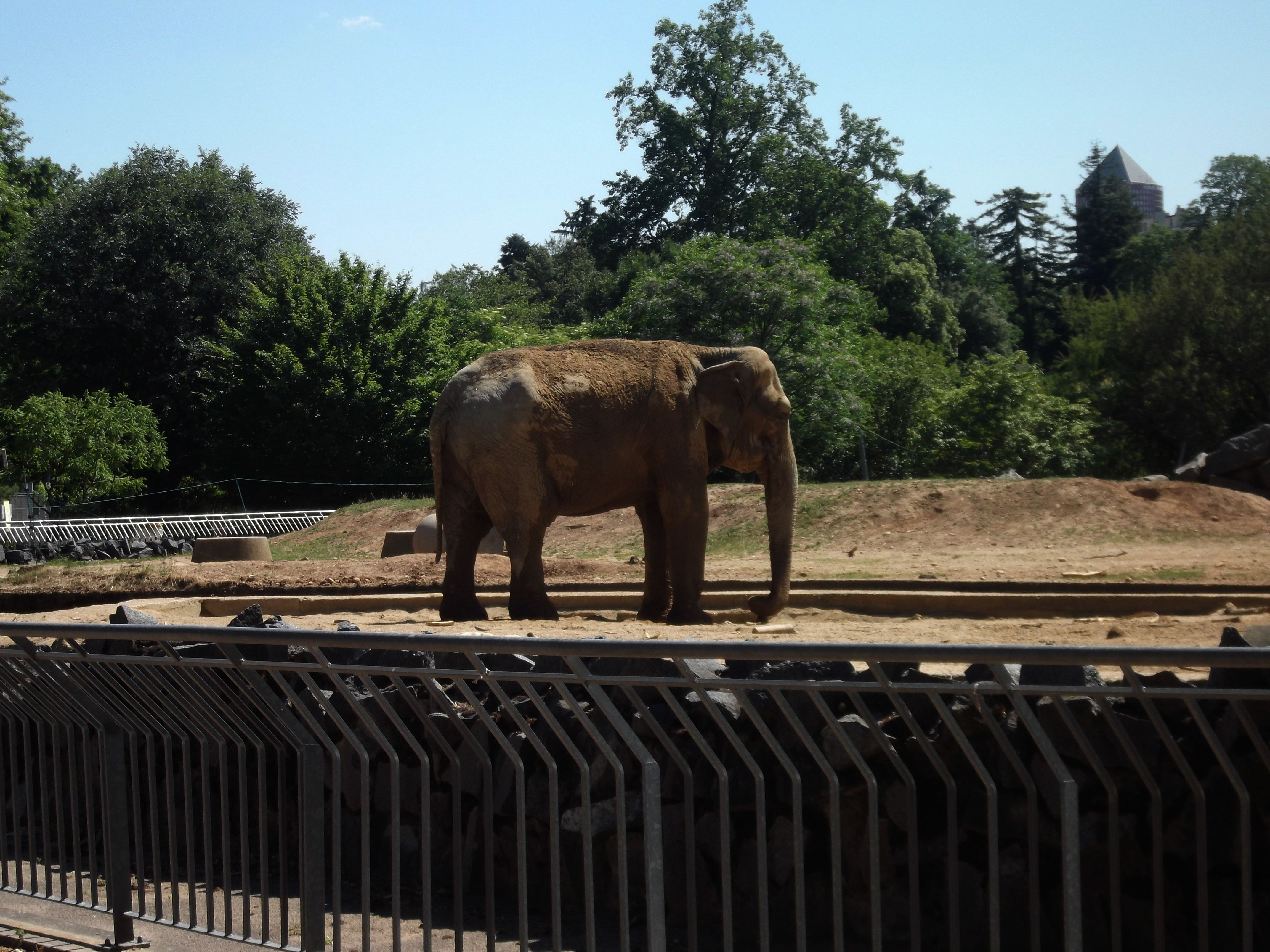 Eléphant du parc de la Tête d'Or